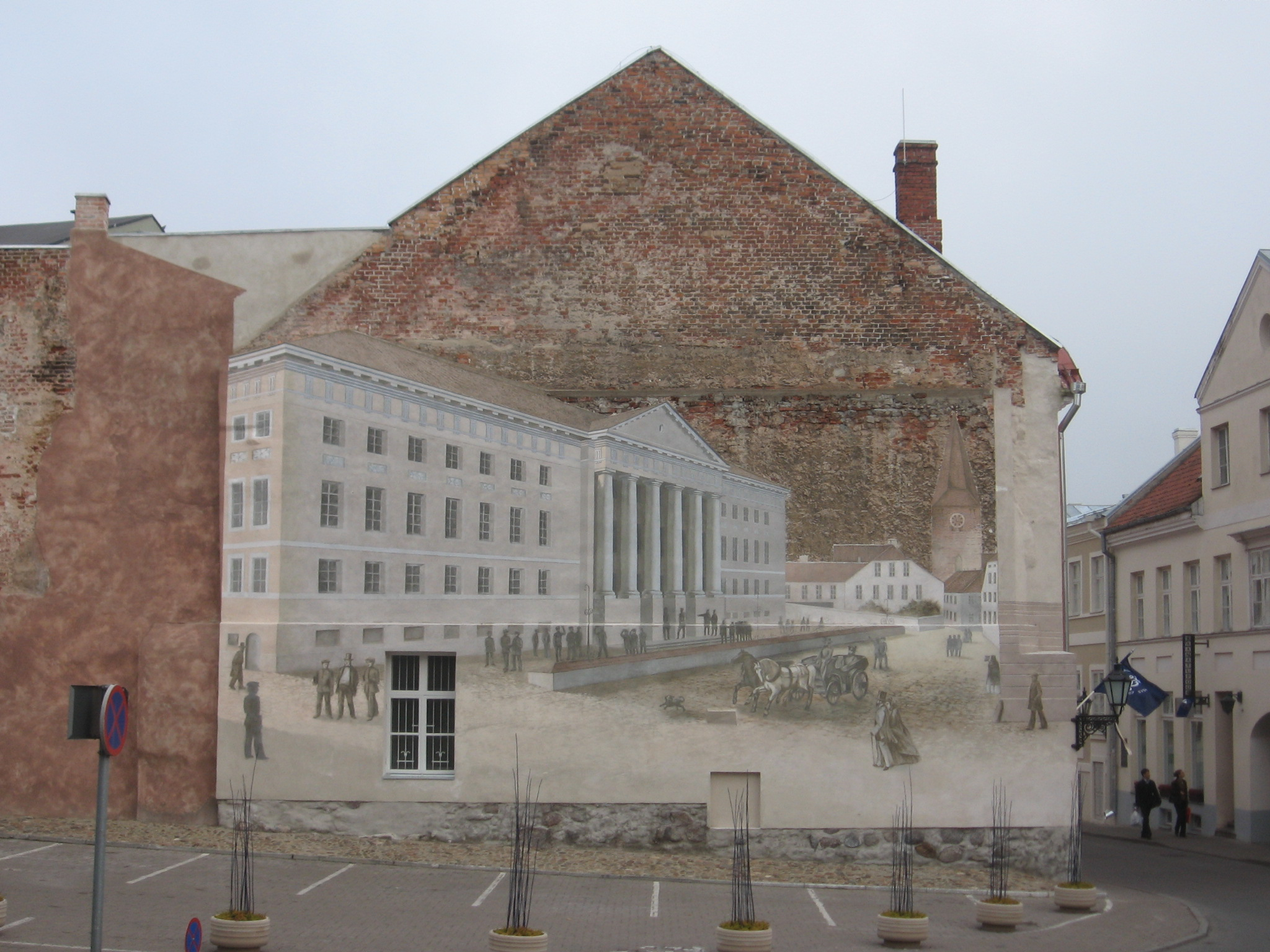 Tartu Ülikooli peahoone joonis hoone seinal Tartus.